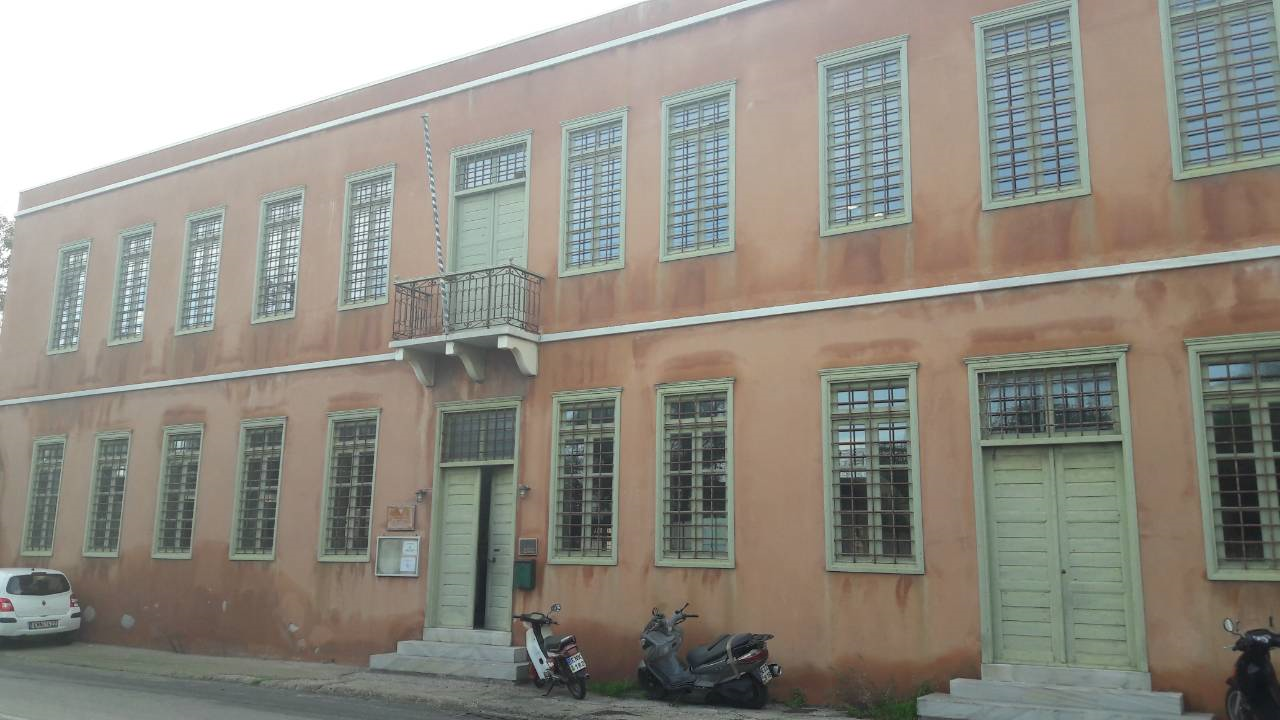 Η βιβλιοθήκηκ του τμήματος προσφέρει συγγράμματα από όλους τους κλάδους που αφορούν το αντικείμενο σπουδών.